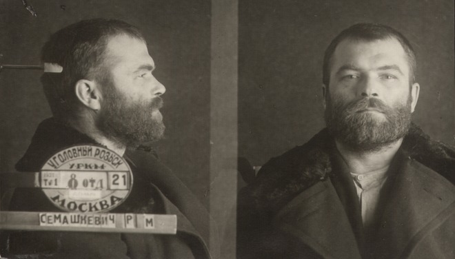 Мастак Раман Семашкевіч у турме НКУС (фотаздымак)